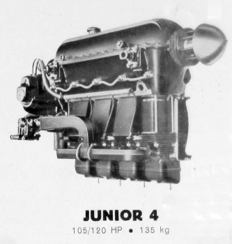 letecký motor Walter Junior 4 (1934)